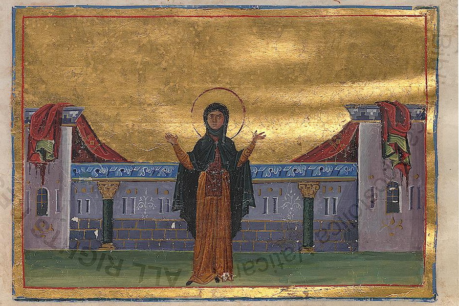 Феодора Александрийская Миниатюра Минология Василия II. Константинополь. 985 г. Ватиканская библиотека. Рим